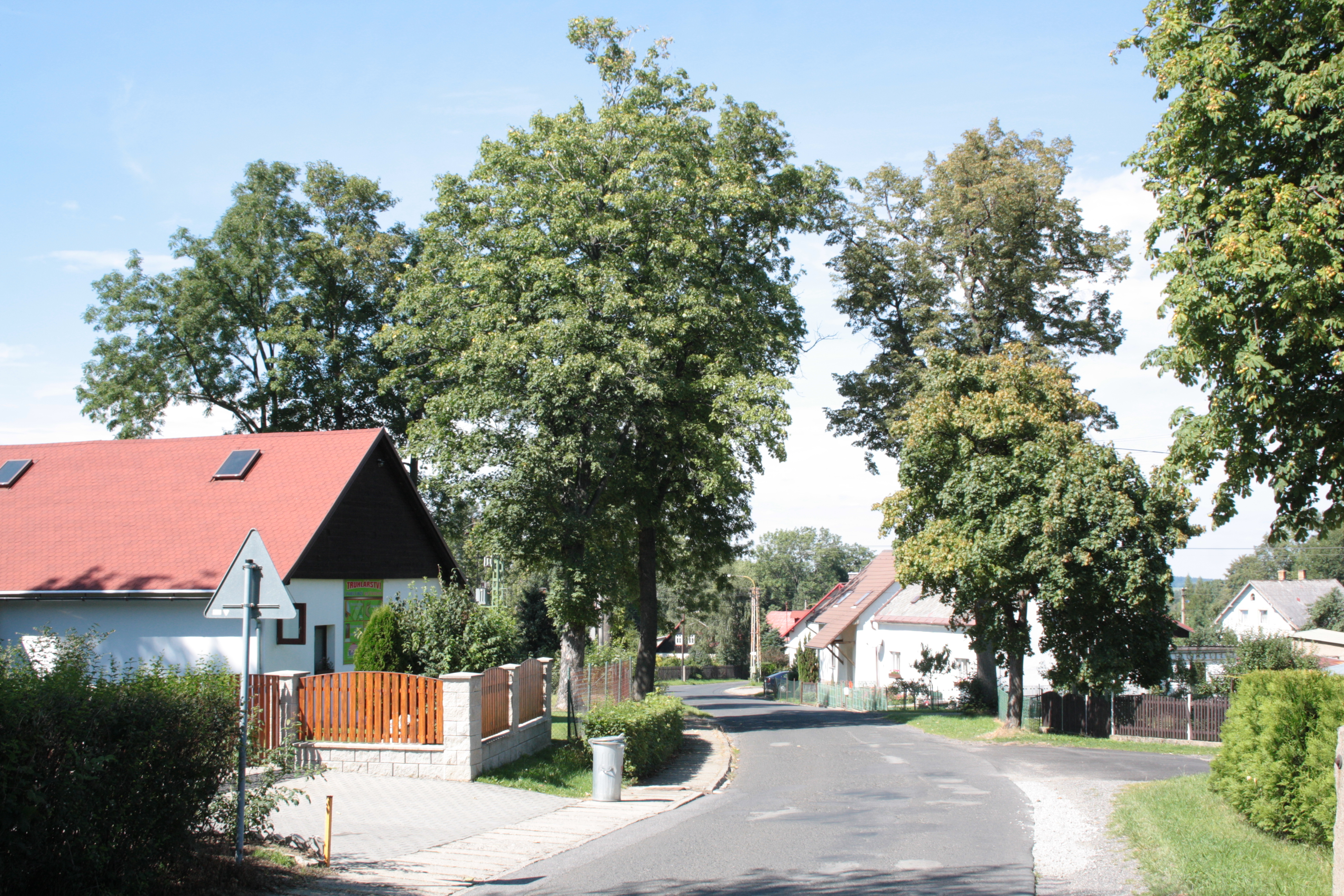 This photograph was taken with a DSLR from WMCZ's Camera grant. Místní komunikace v Ludvíkově pod Smrkem.